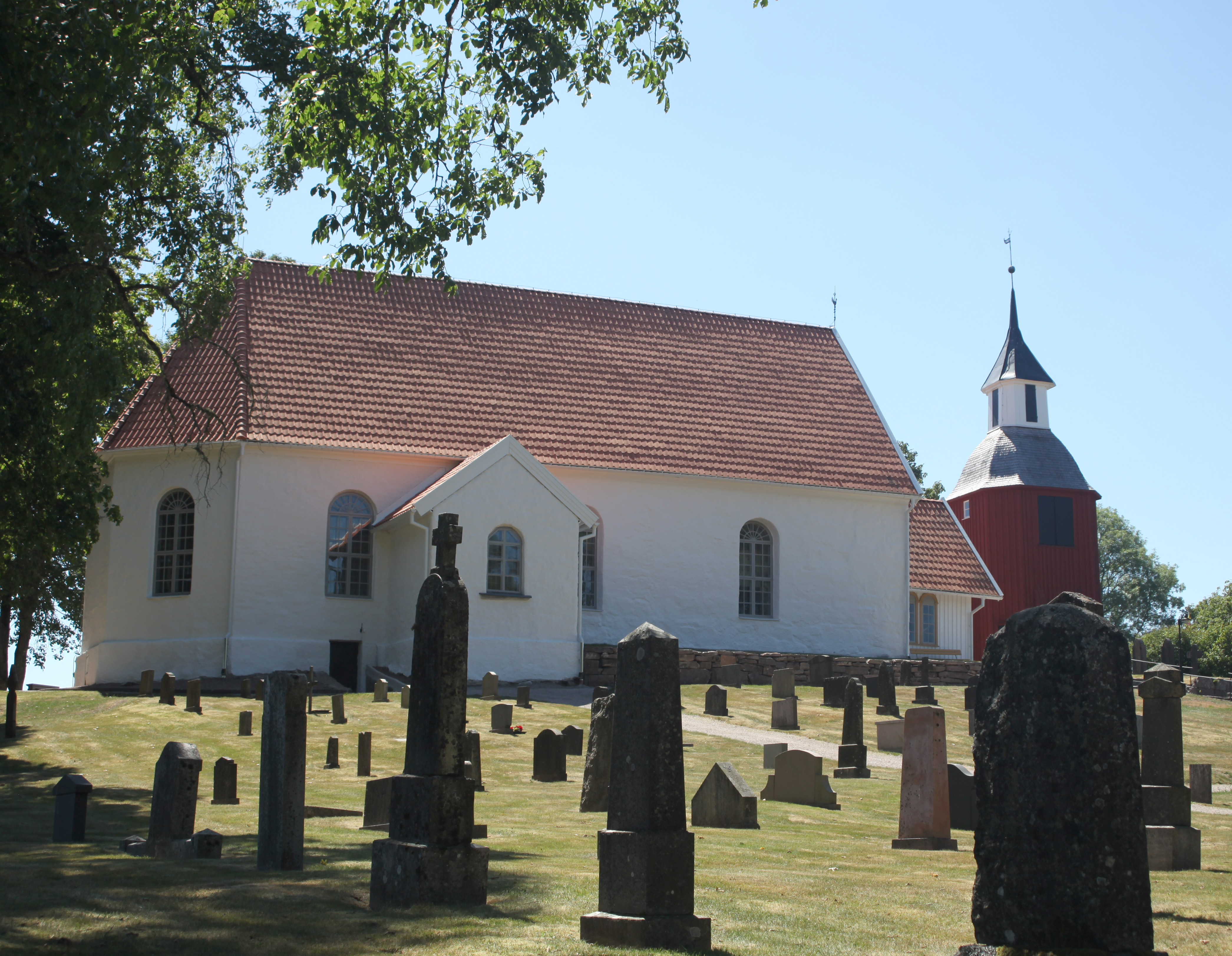 Månstads kyrka